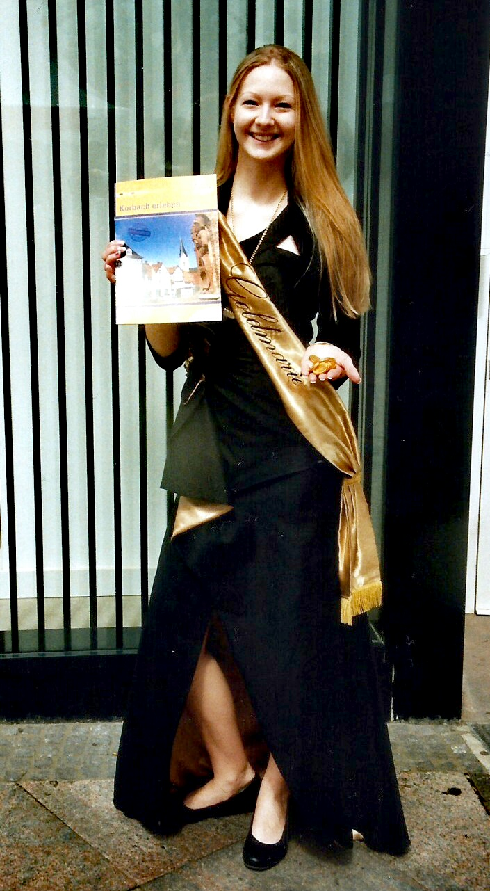 Die Goldmarie präsentiert auf dem 34. Hansetag in Lübeck Gold aus der Hansestadt Korbach.